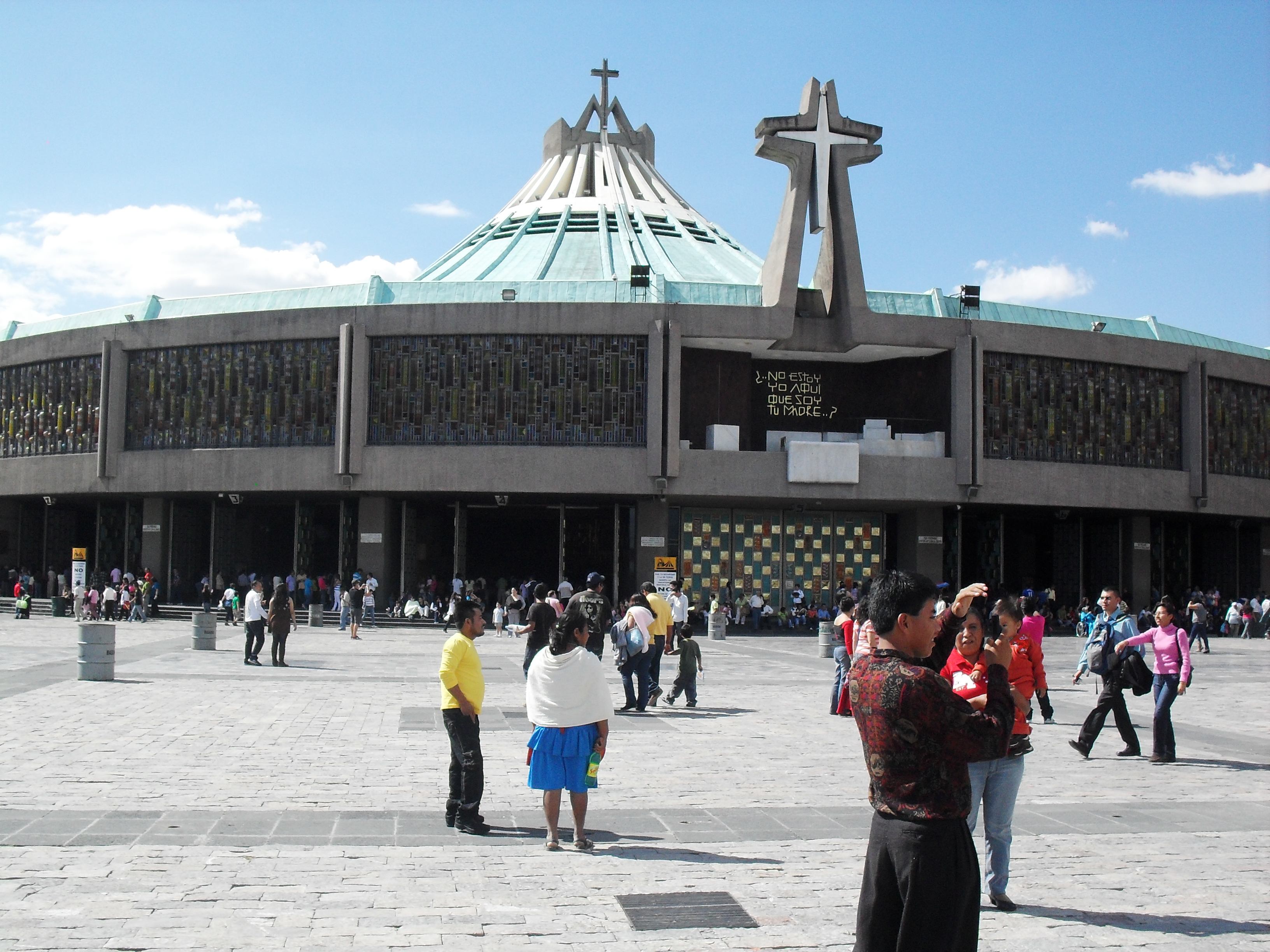 La nueva Basílica de Guadalupe